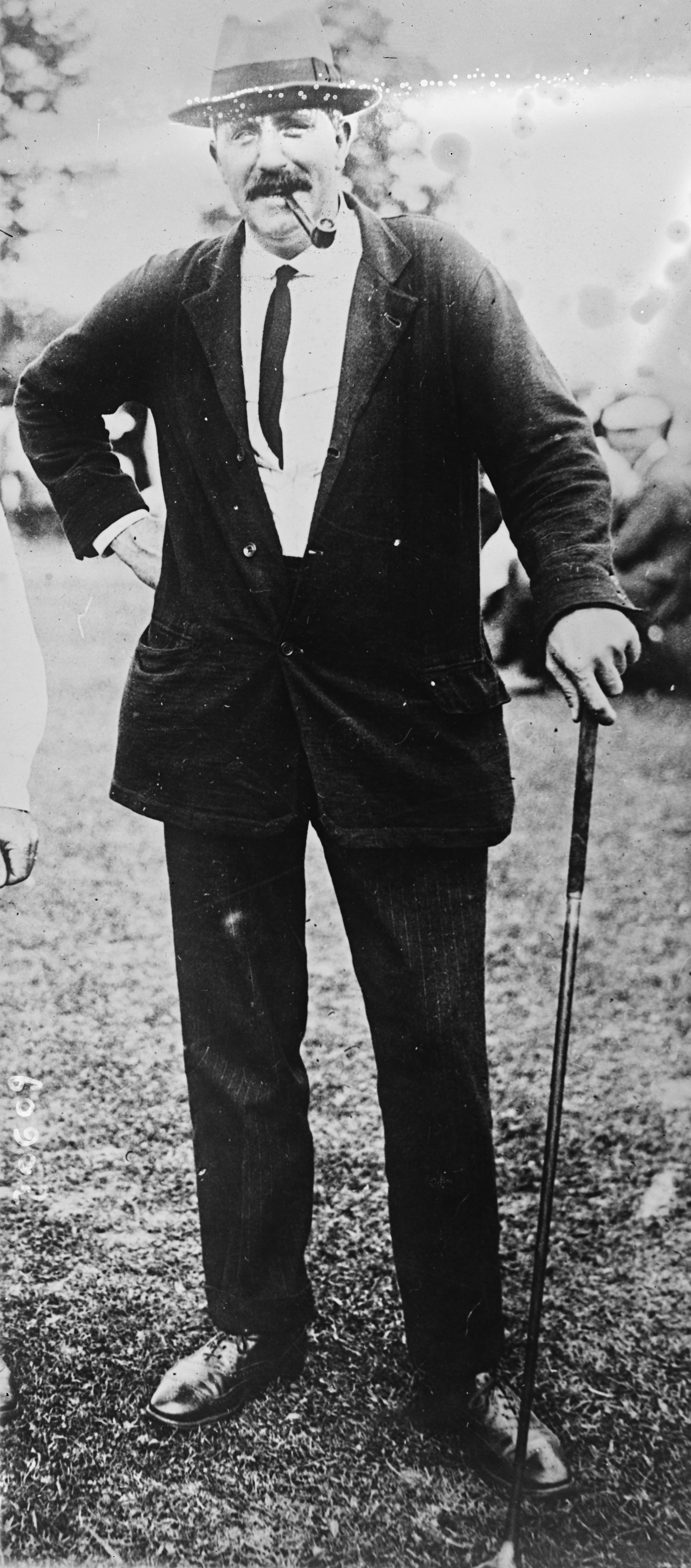 Ted Ray, champion du monde de golf [photo prise à Shawnee-on-Delaware, juillet 1920].